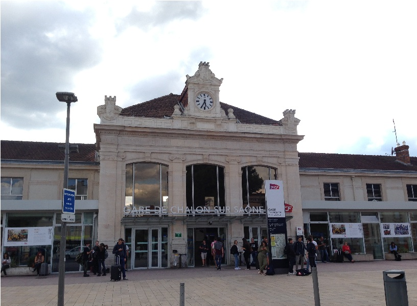 法国沙隆-索恩站（索恩河畔沙隆站）